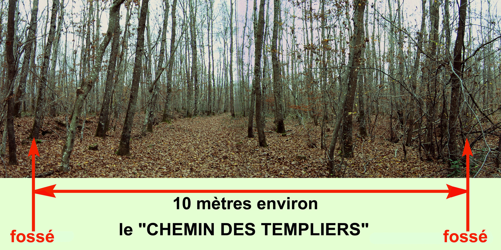 Voie connue sous les termes de "voie antique...voie romaine...chemin (ou allée) des templiers...traces encore bien visibles près du Chêne de Montaloyer.